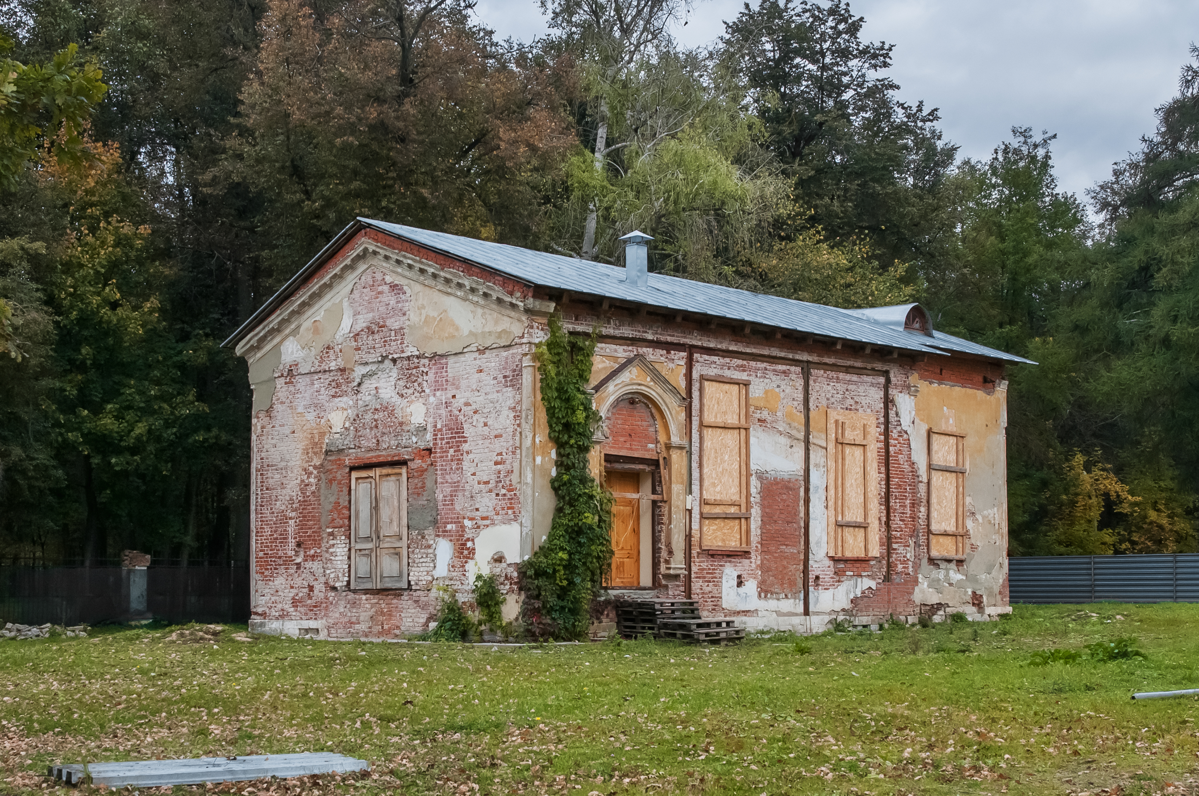 Церковь Грузинской иконы Божией матери: улица Лермонтова, 3, Воскресенск, Воскресенский район, Московская область